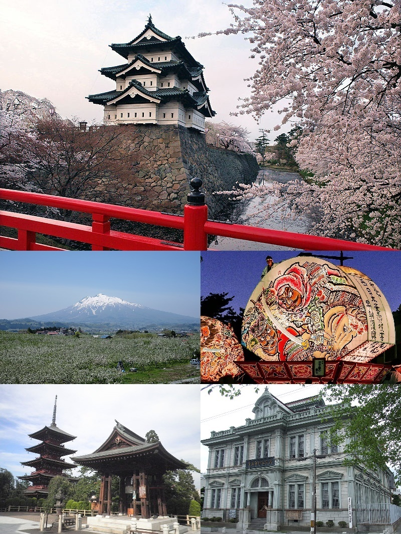 青森県弘前市のモンタージュ画像。